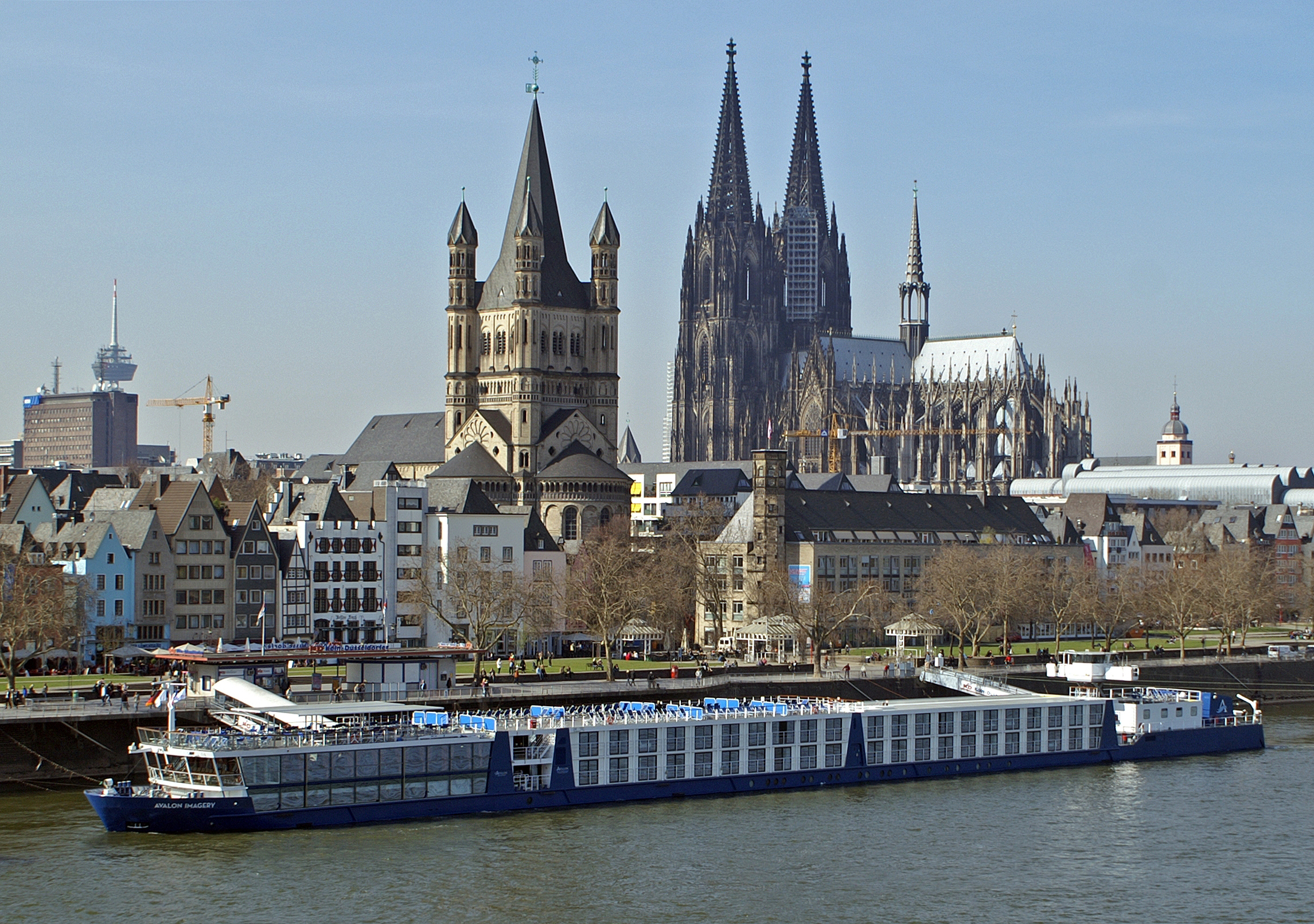 Der TwinCruiser Avalon Imagery am Anleger Köln, Frankenwerft